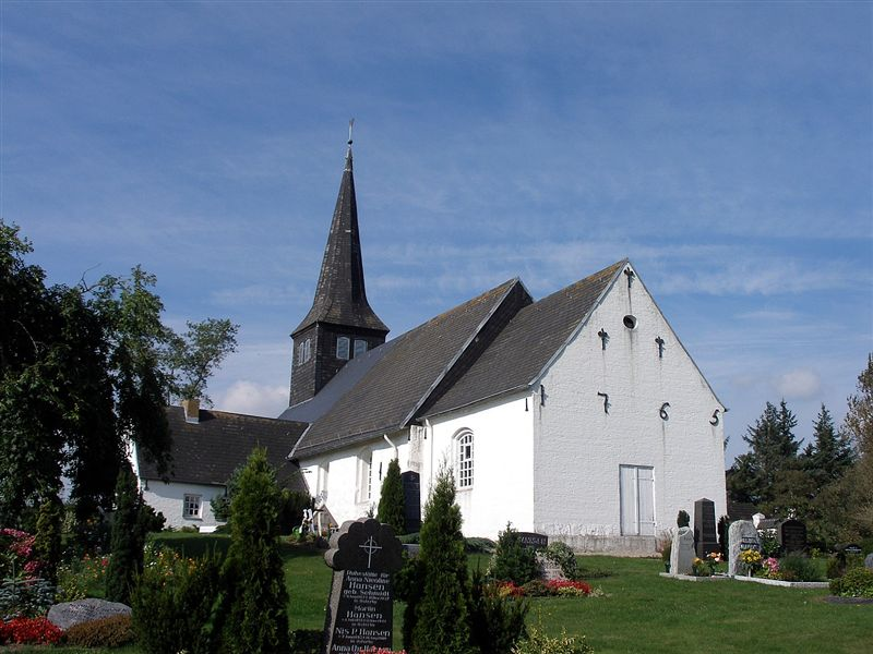 Medelby Kirke i Sydslesvig. Medelby kirke